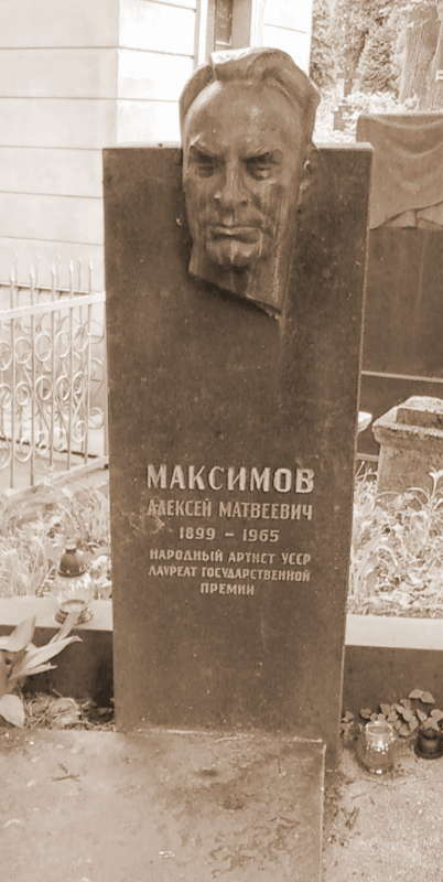 Памятник на могиле Алексея Матвеевича Максимова (1899—1965) — актёра театра и кино, режиссера. Лауреата Сталинской премии (1952). Народного артиста Украинской ССР на Лычаковском кладбище (Львов).